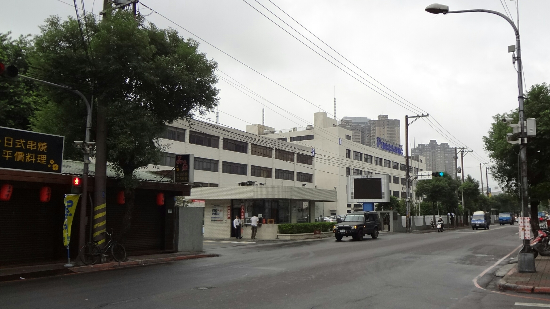 台灣松下電器總部，地址：新北市中和區員山路579號。